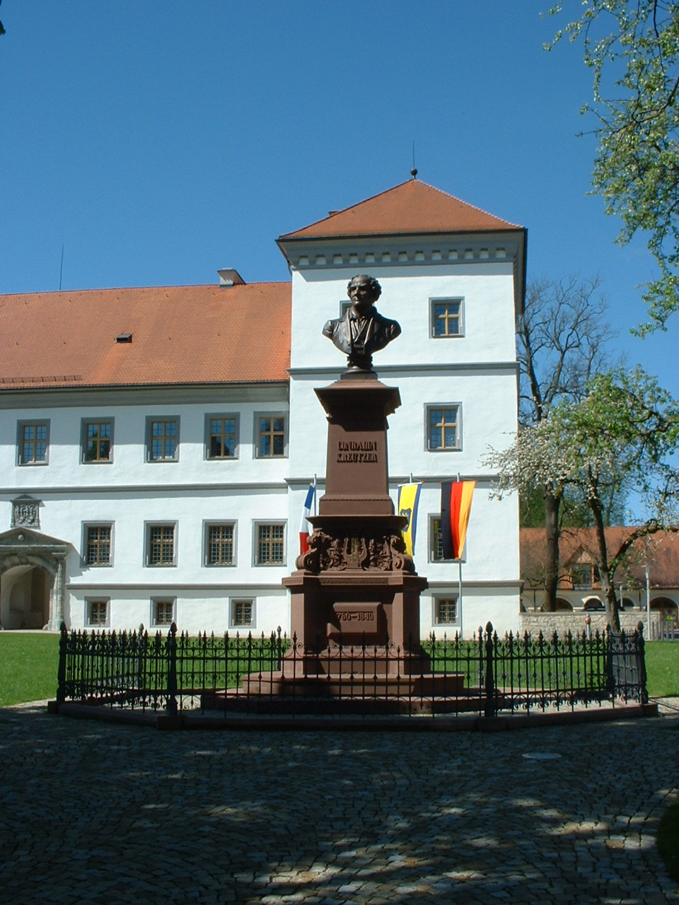 Denkmal zu Ehren Conradin Kreutzers in Meßkirch, dahinter das Schloss der Herren von Zimmern